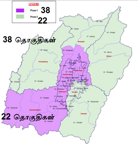 மணிப்பூர் தேர்தல் வரைபடம். முதல் கட்டம் 38, இரண்டாவது கட்டம் 22 இந்திய தேர்தல் ஆணைய பக்கத்தில் இருந்து எடுத்தது.